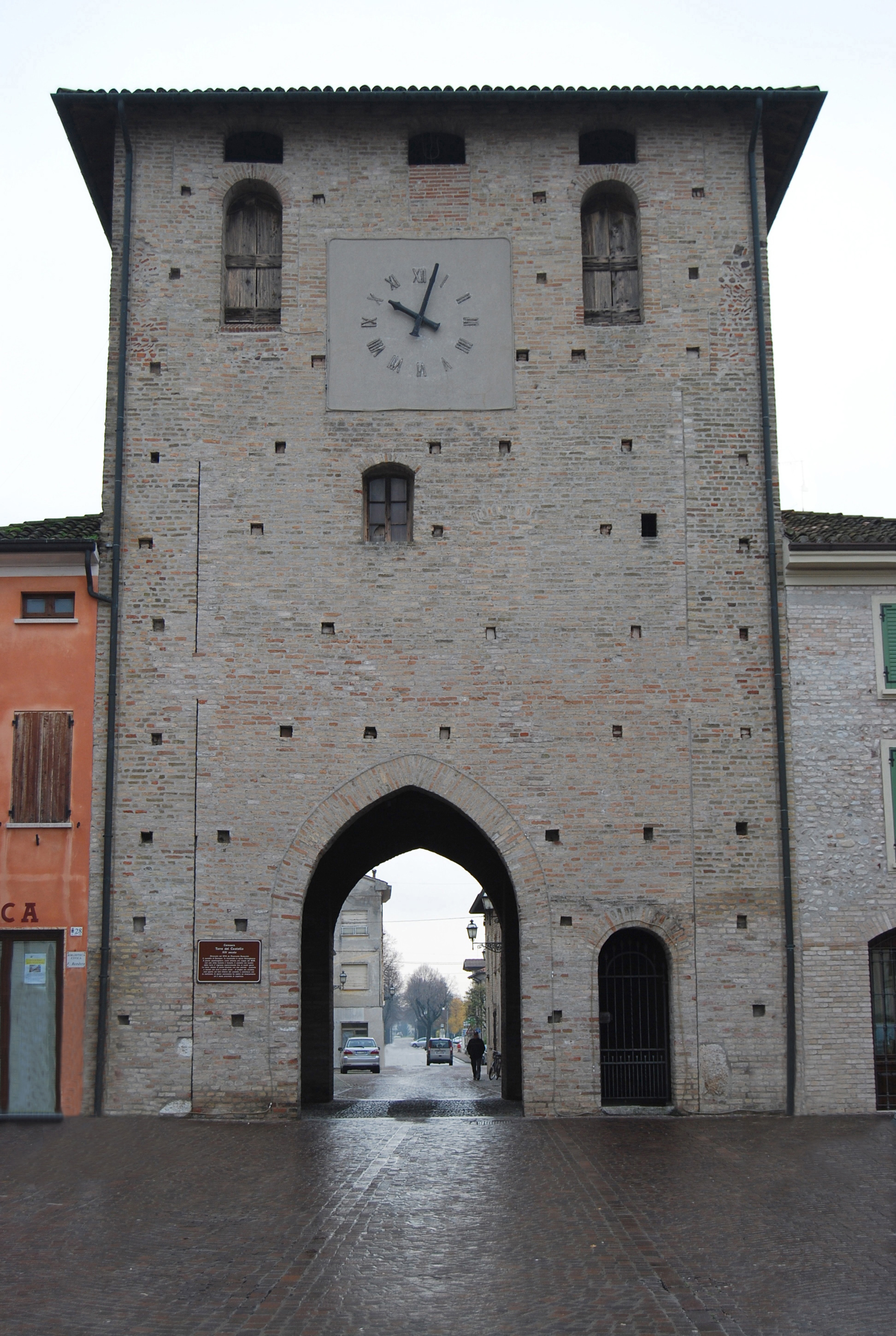 Ceresara, torre dell'orologio.